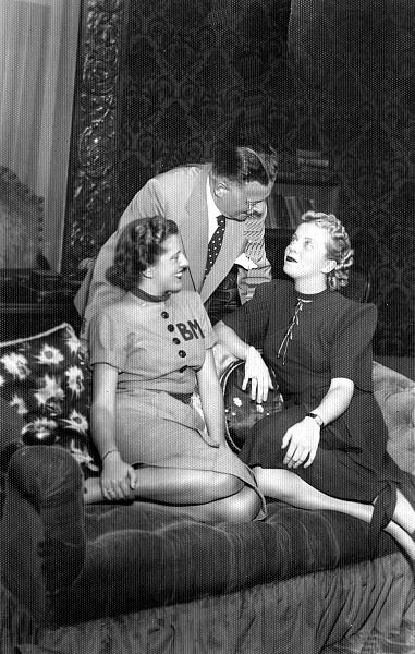 Bókay János: Ragaszkodom a szerelemhez. Belvárosi Színház. Tahy Anna Mária (Mimi), Góth Sándor (Bajor Kálmán), Sennyei Vera (Vali).